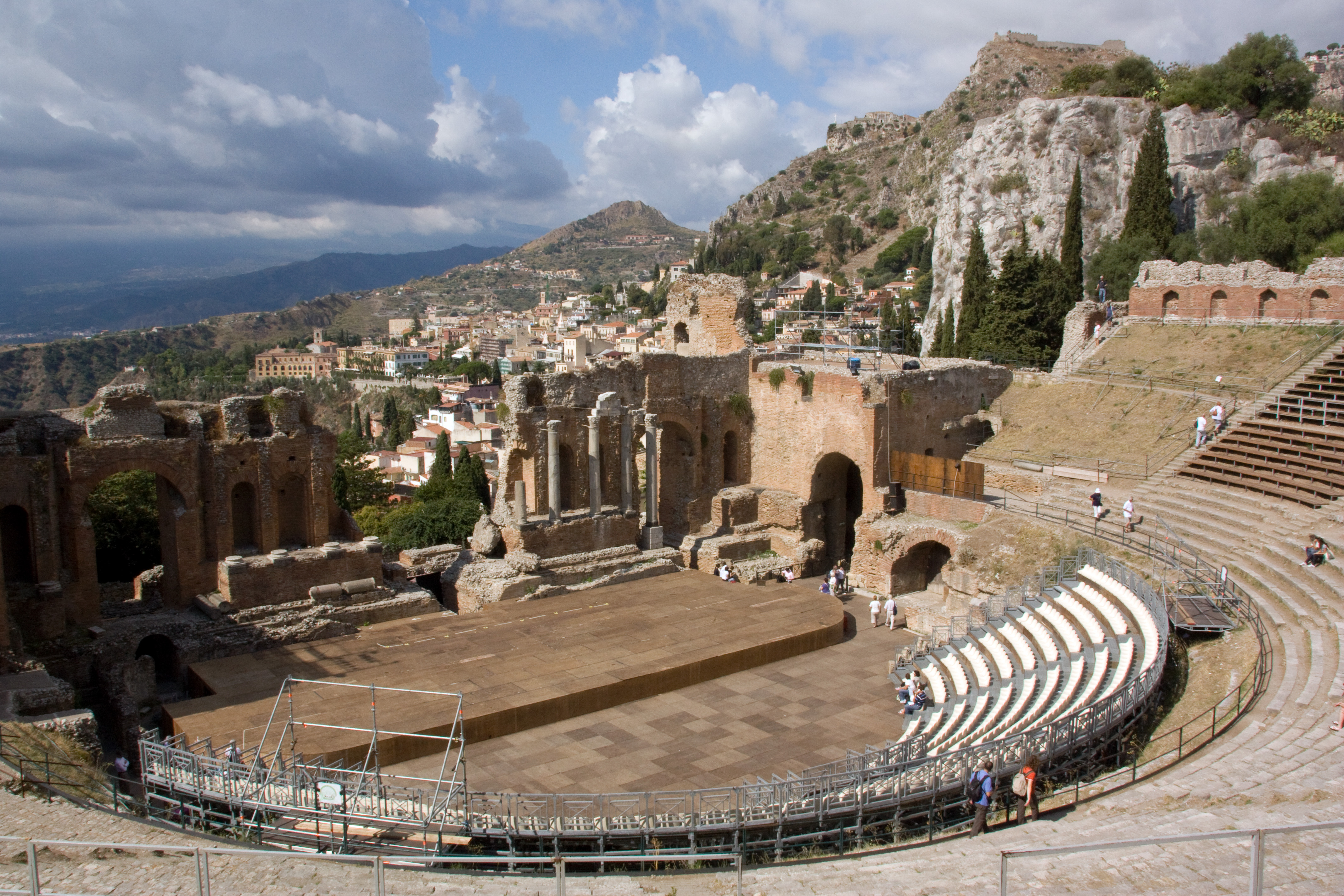 Théâtre greco-romain de Taormina